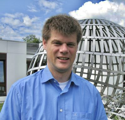 Foto di Christoph Thiele